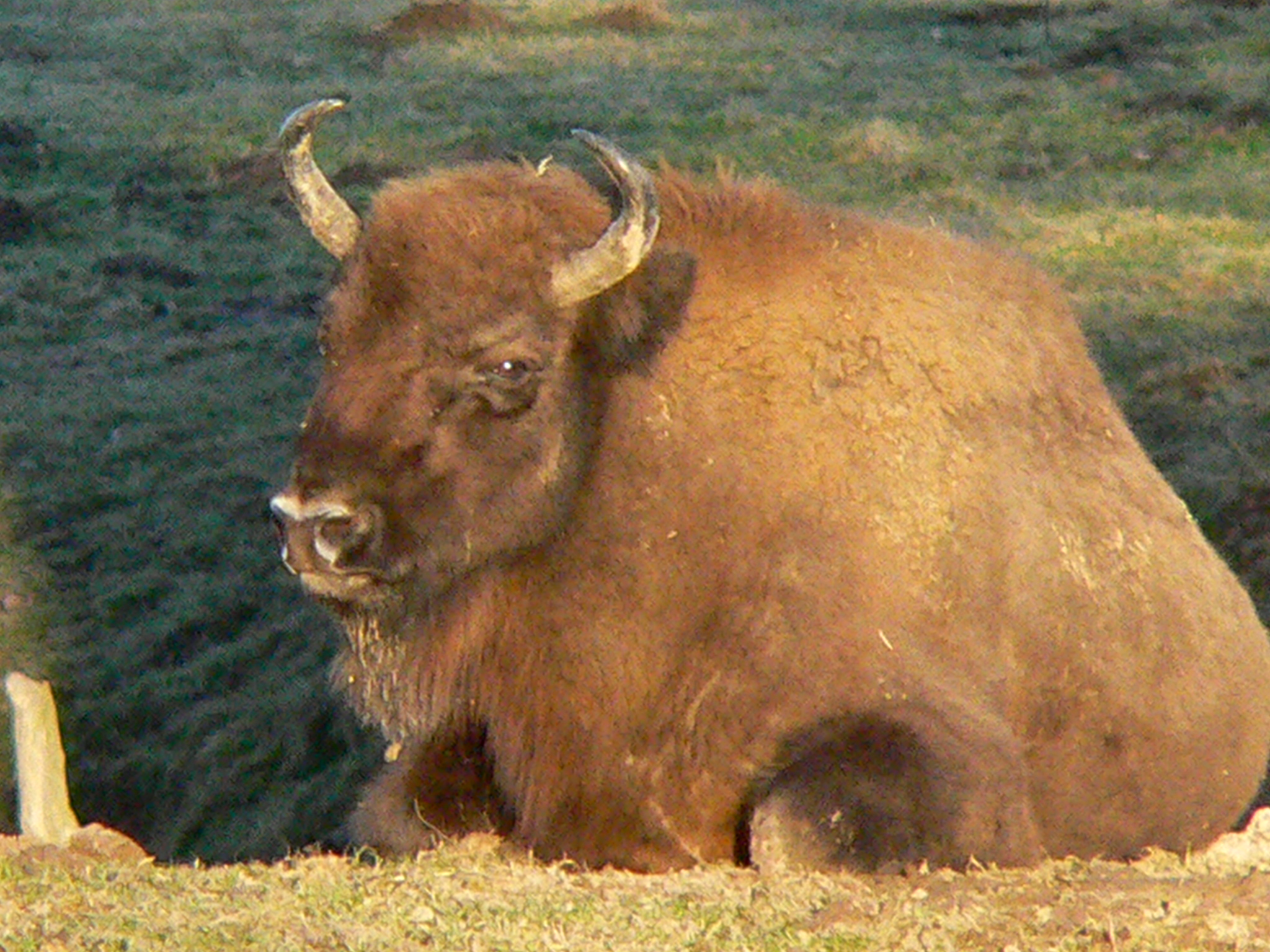 Im Tierpark Sababurg im Reinhardswald (Hessen), Wisent